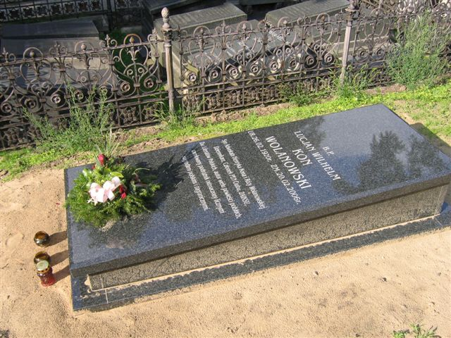 Lucjan Wolanowski's monument